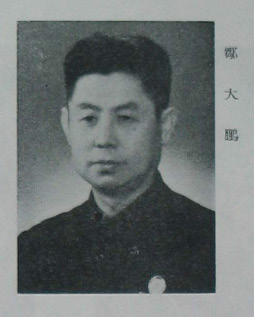 中國人民政治協商會議第一屆全體會議代表